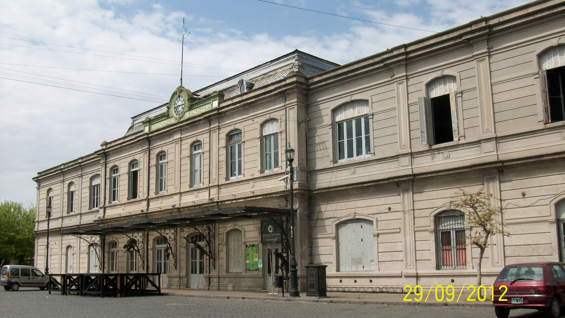 Escuela N.º 11 "Florentino Ameghino"